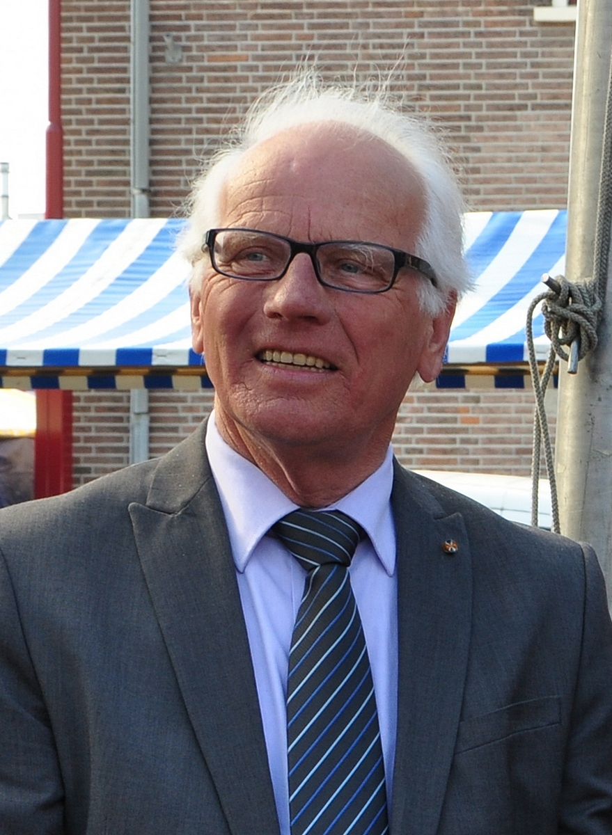 Pieter van der Zaag.